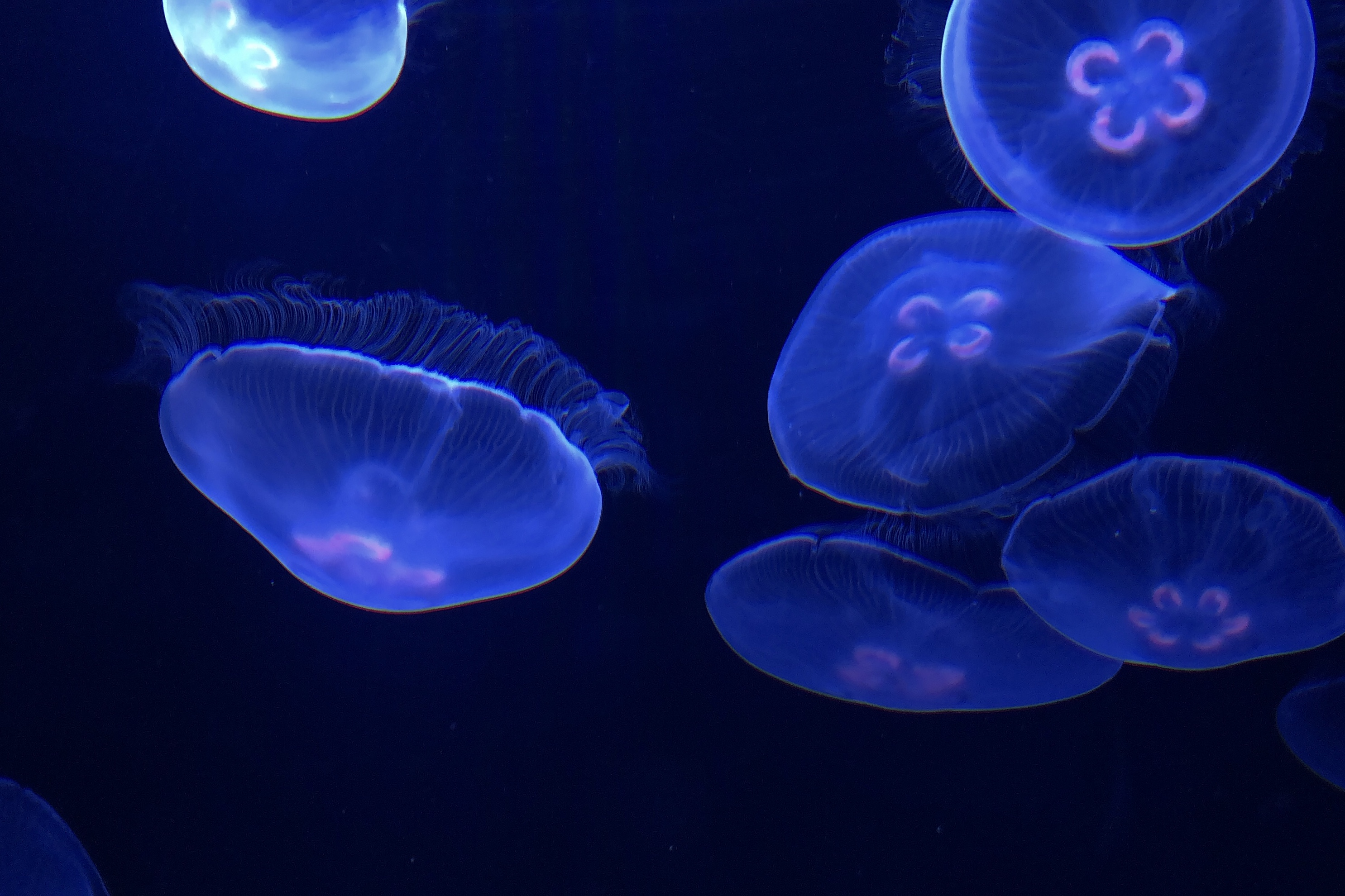 Jellyfish in Sumida Aquarium, Tokyo.